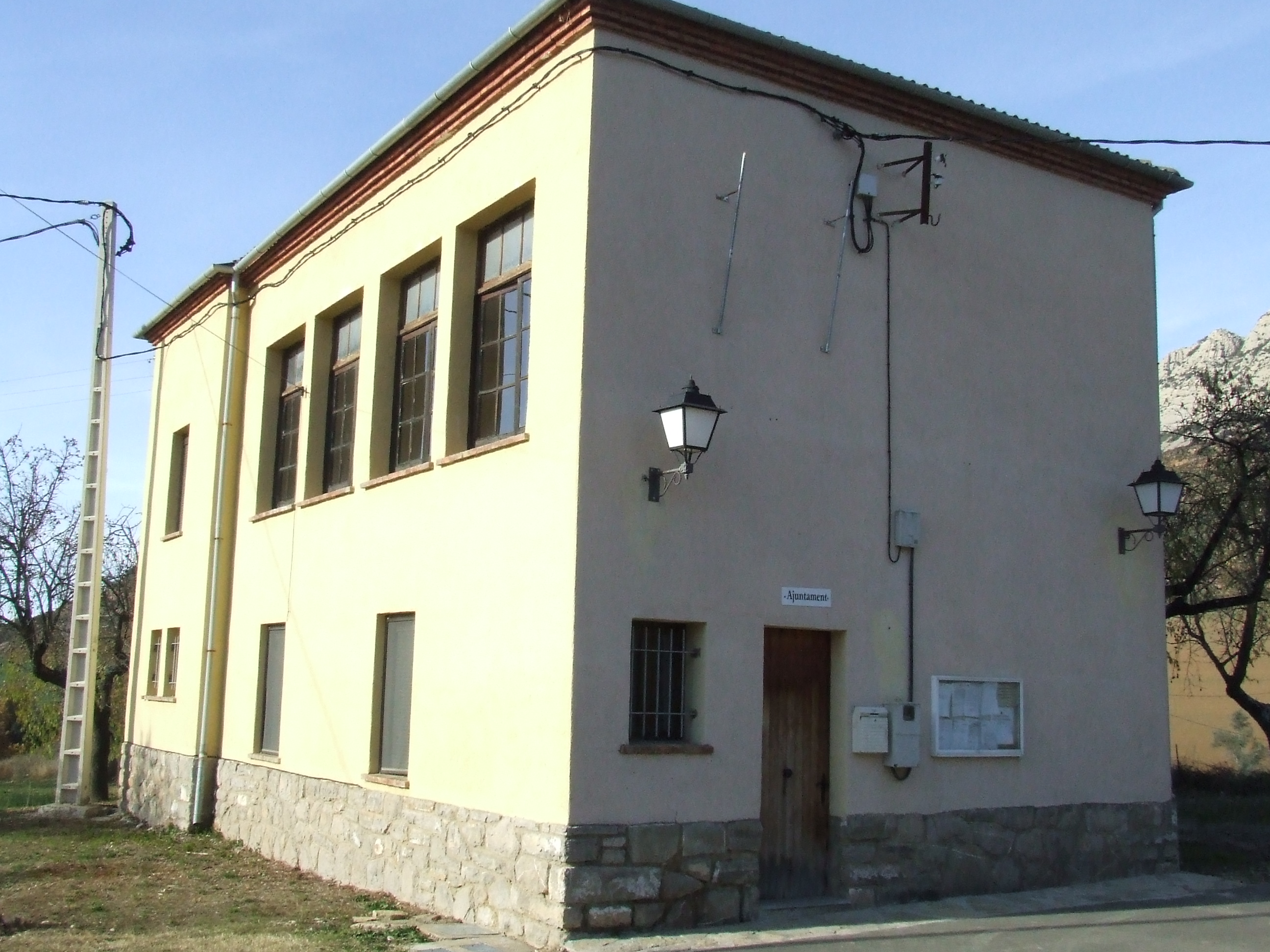 La Casa de la Vila d'Abella de la Conca (Pallars Jussà)